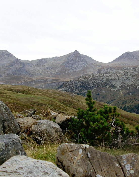 Zicht op de Pizzo dell'Uomo vanaf de Lukmanierpas